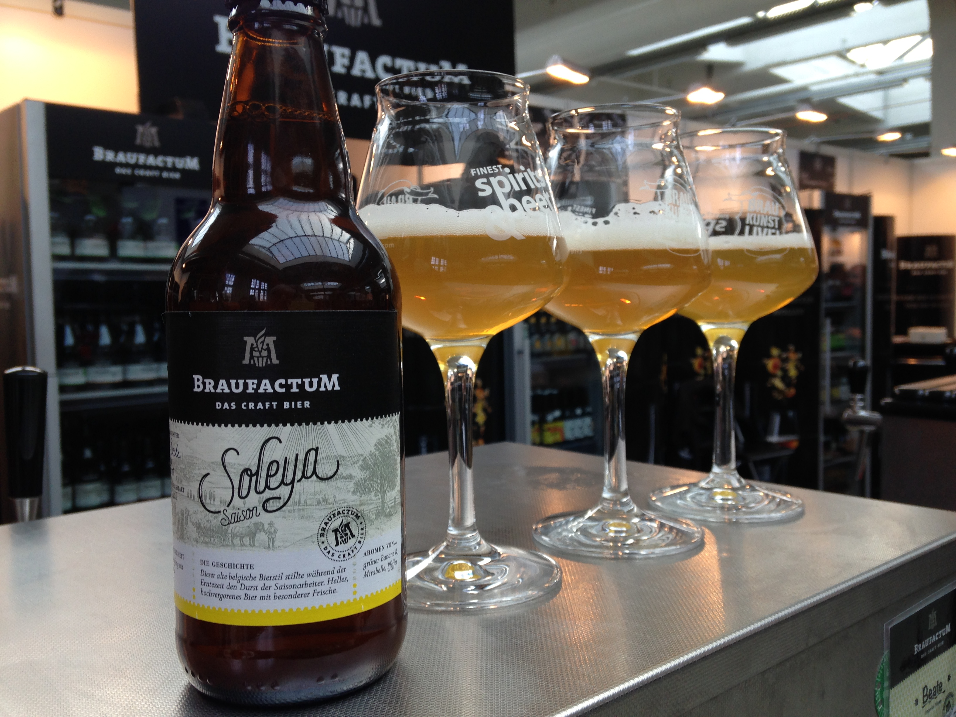 Braukunst live 2016 Bier Saison "Soleya" von Braufactum